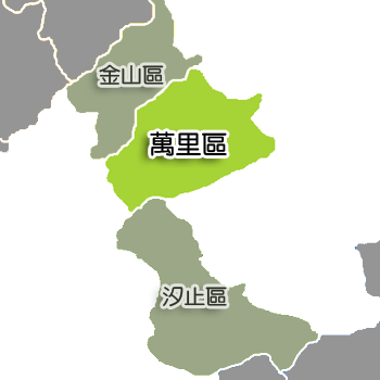 萬里區相對位置。